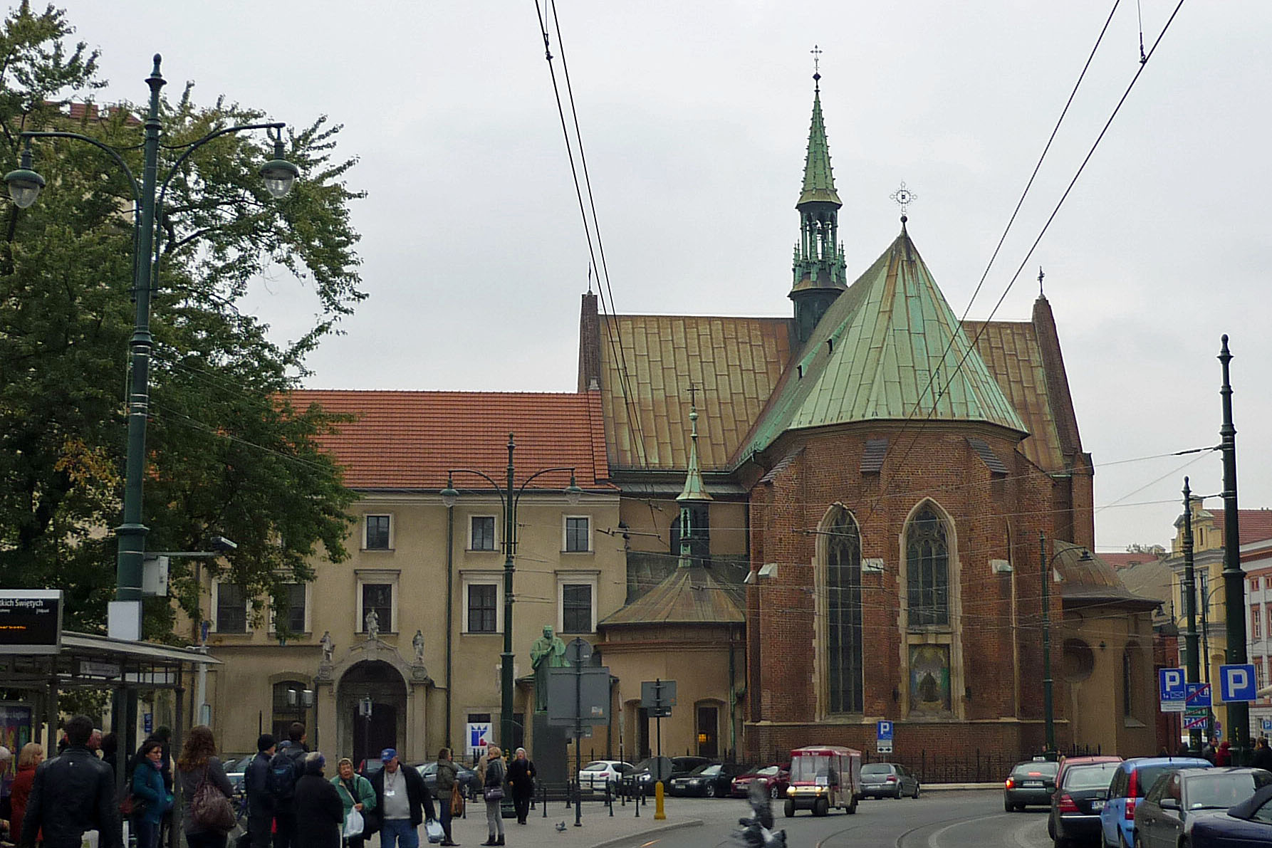 Franziskanerkirche in Krakau